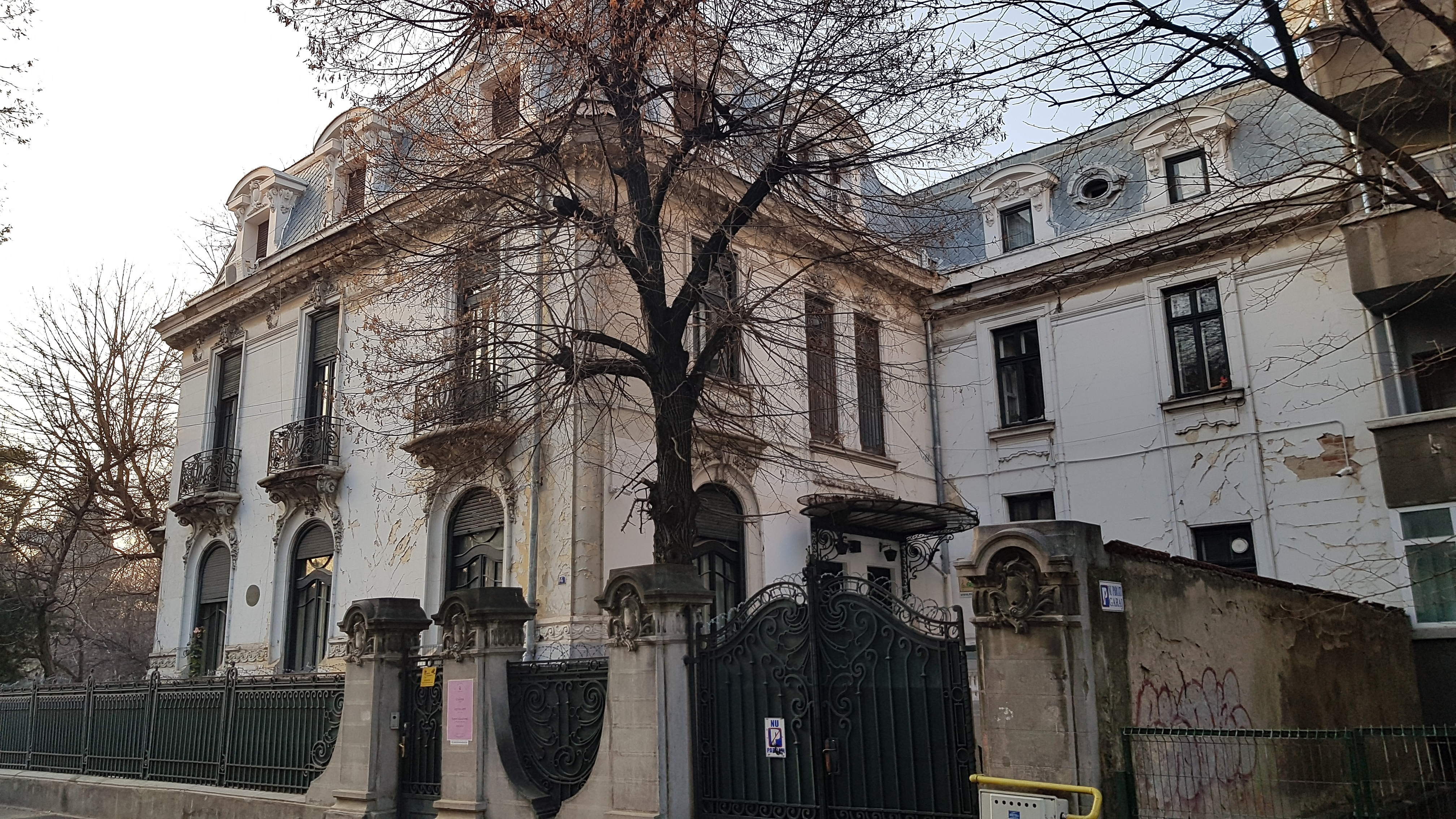 Casa Ion Voicu